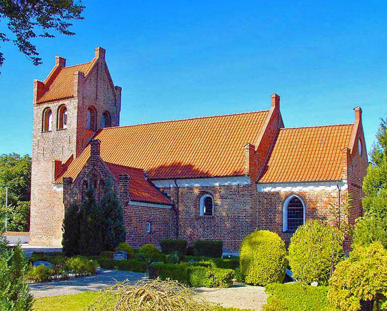 fra syd